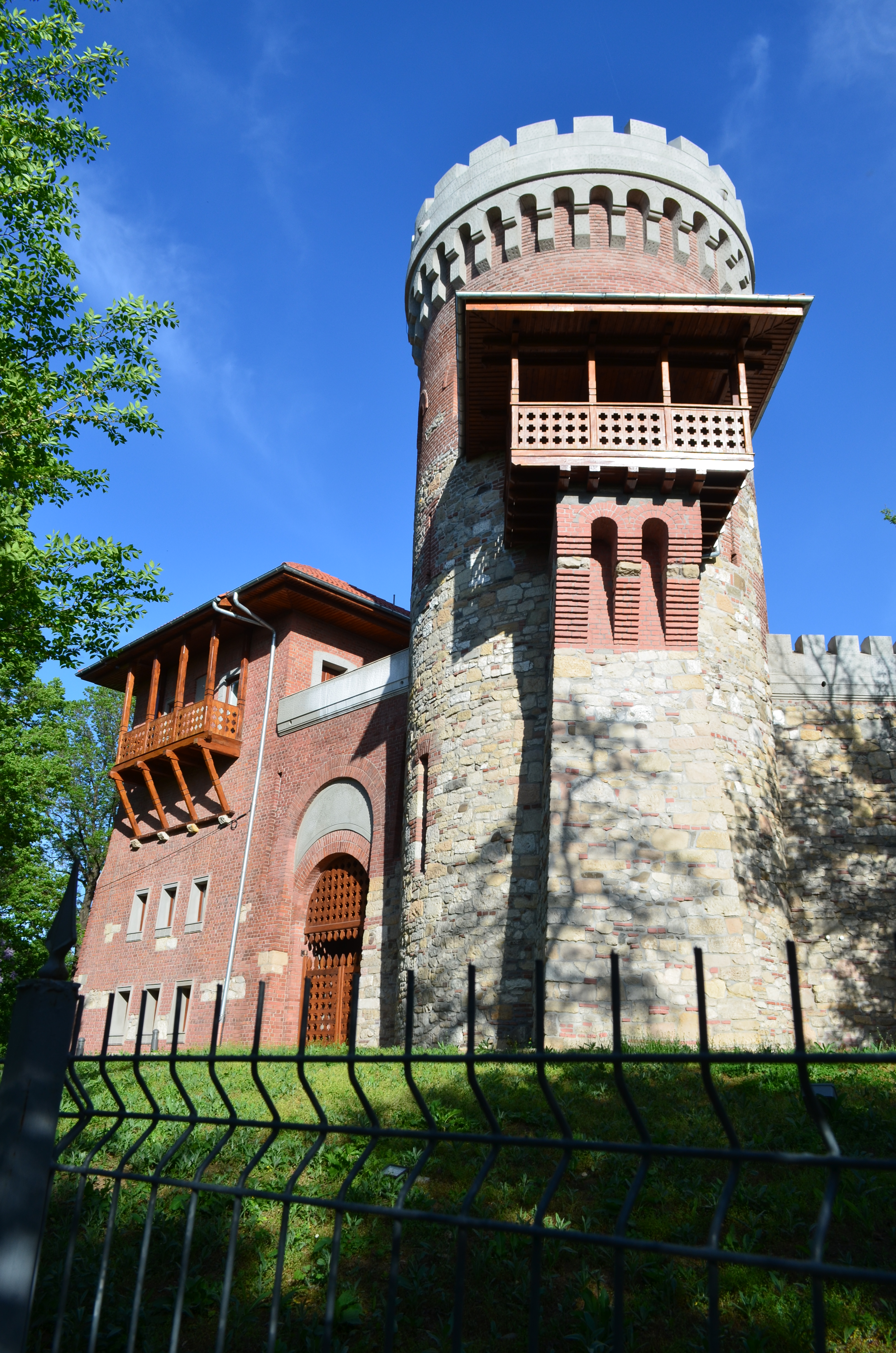 Cetatea lui Vlad Țepeș din Parcul Carol, București